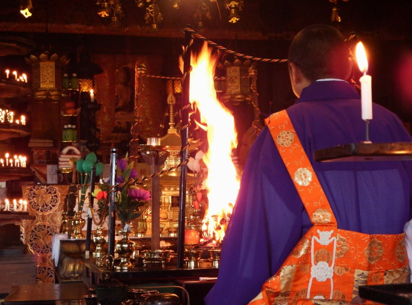 童学寺の護摩